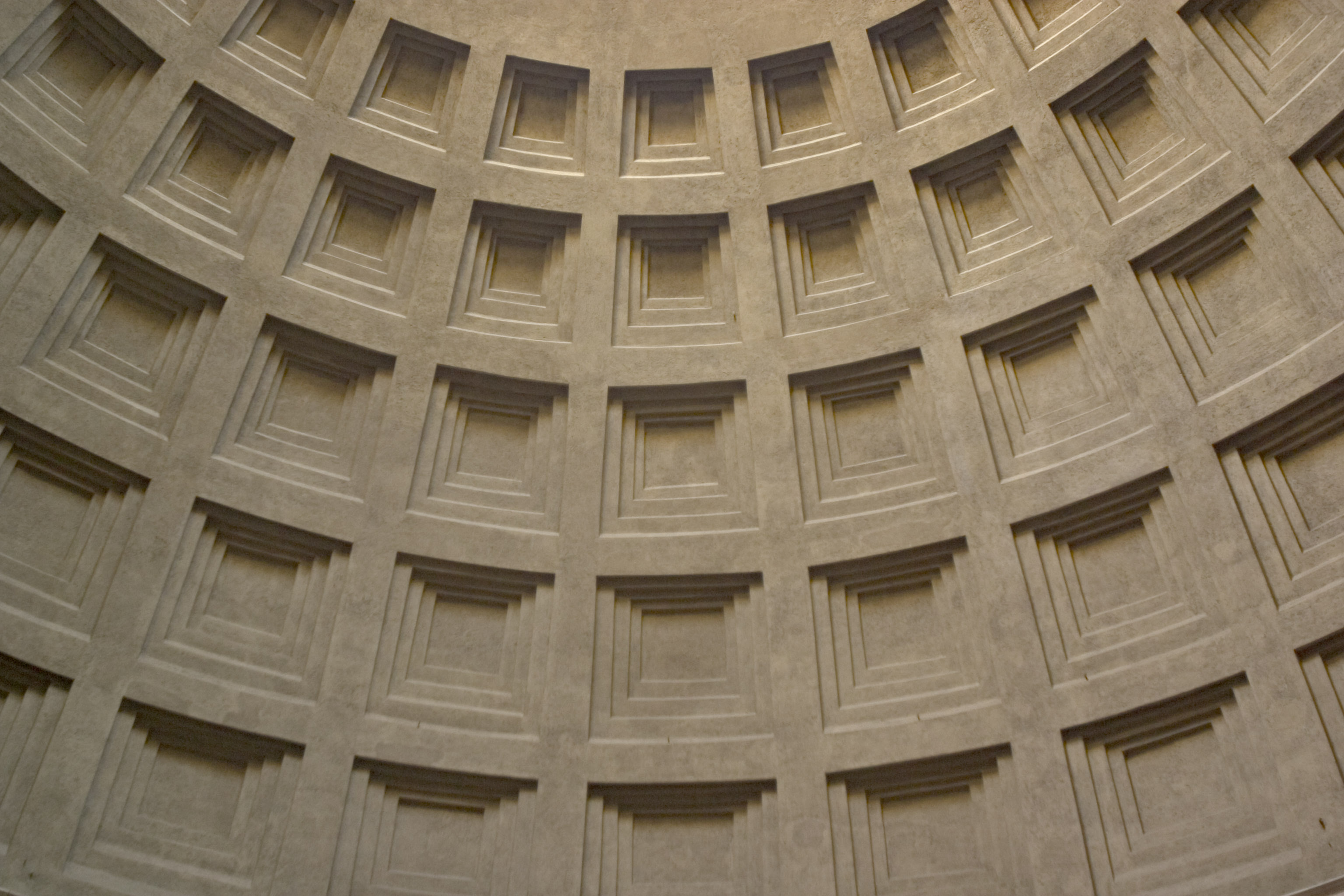 Cupola del Pantheon, Roma, Italia.